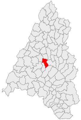 Categorie:Hărţi ale judeţului Bihor